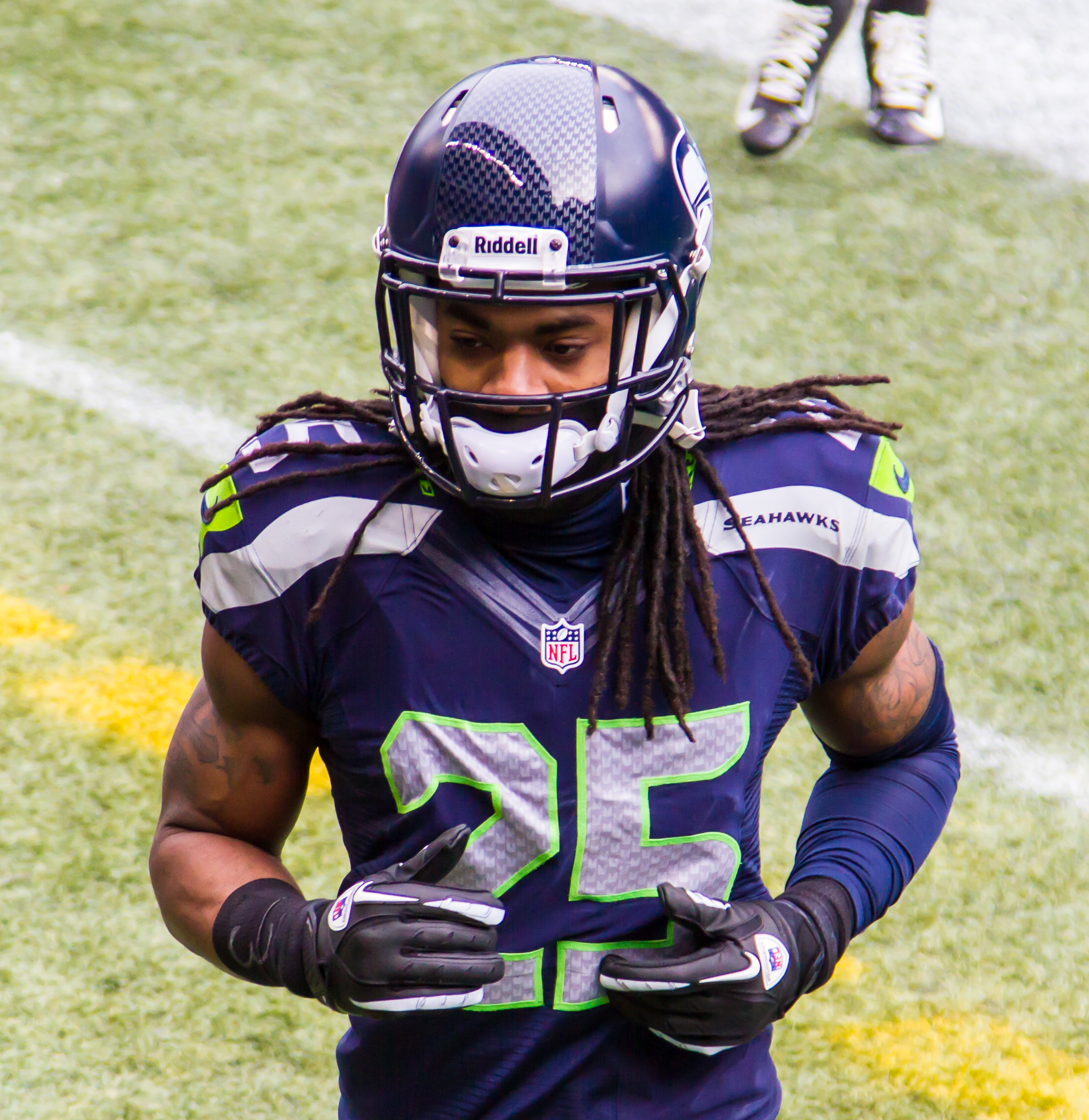 Richard Sherman, Seahawks vs Rams 12.29.13